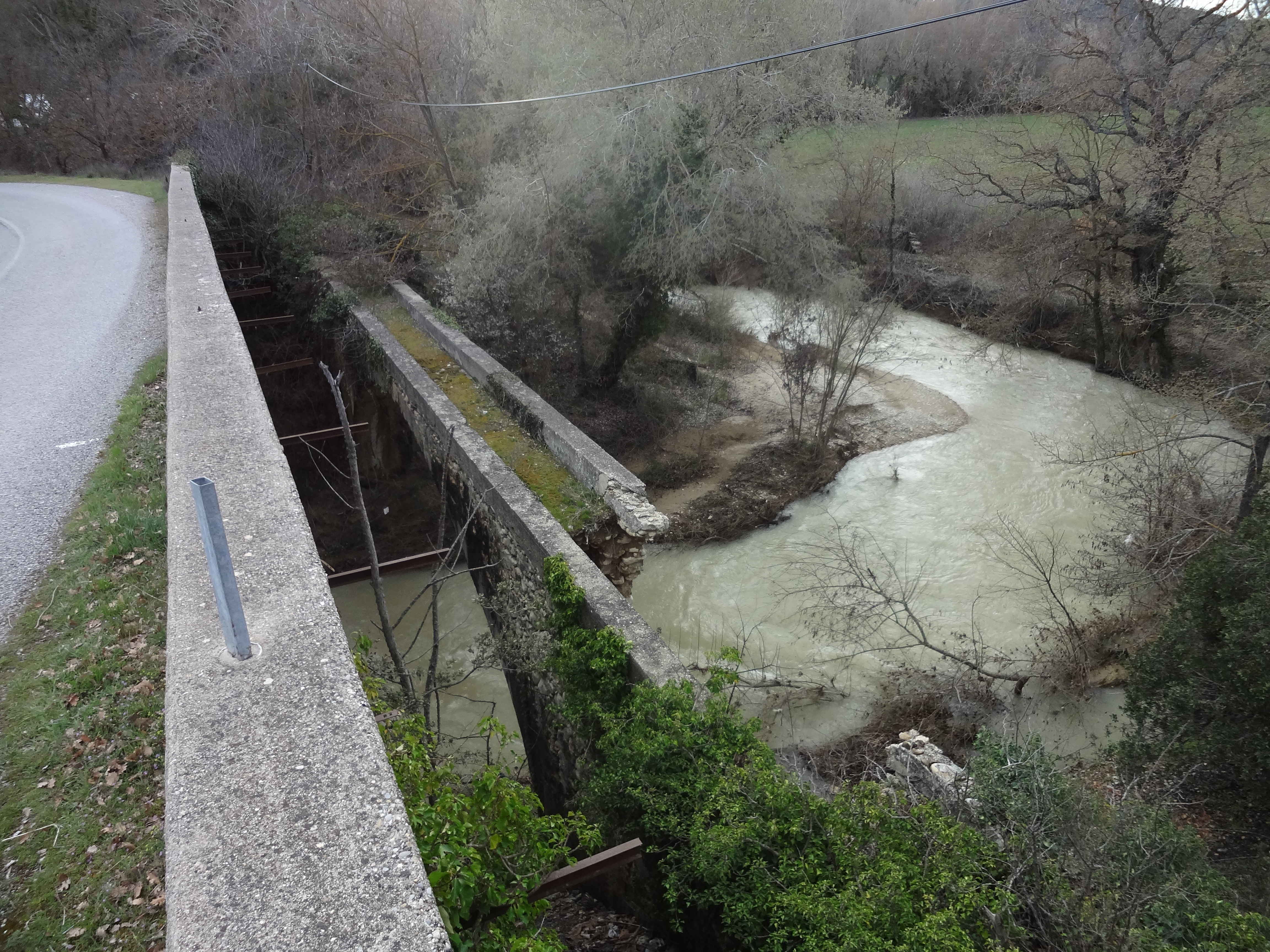 Pont du Pâtre, à la limite entre La Brillane et Villeneuve : pont muletier, doublé d’un pont routier emprunté par l’ancienne RN 96, sur le Lauzon